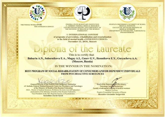 15 ноября 2016 года в рамках конференции III Дроздовские чтения состоялся I Международный конкурс "Осознанный выбор", в ходе которого авторам программы "Православные семейные клубы трезвости" был вручен Диплом Лауреата